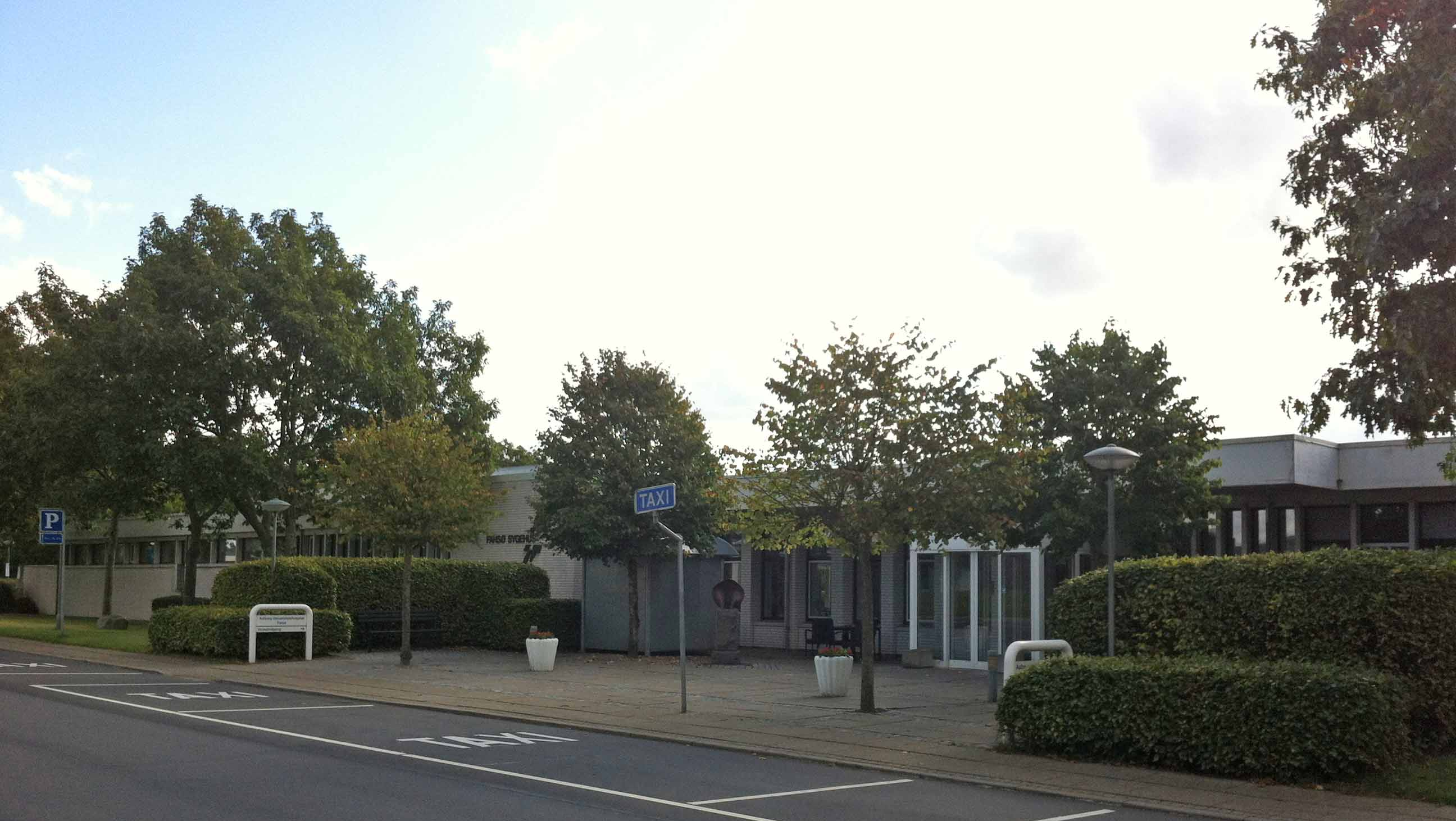 Farsø Sygehus